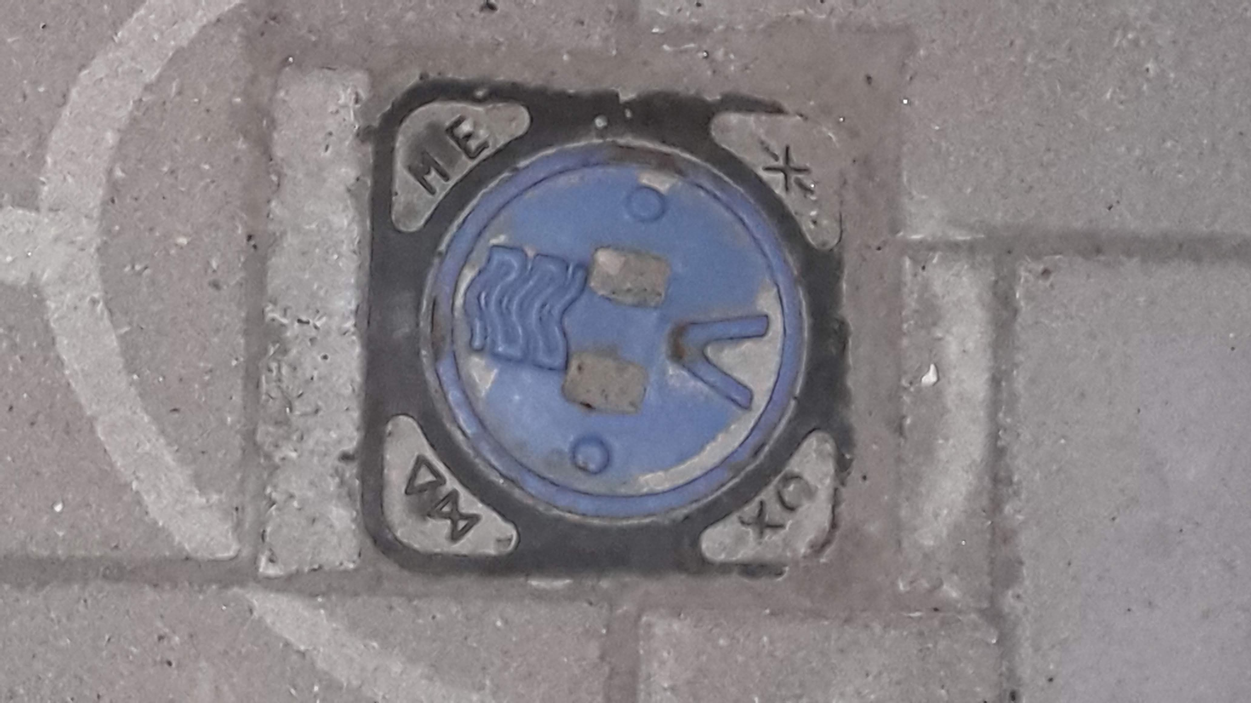 Een kunststoffen straatpot van AVK voor de afsluiter van een waterleiding.